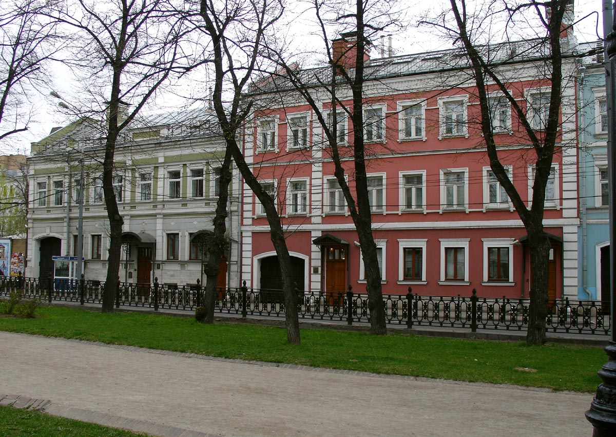 Petrovsky Boulevard, Moscow.